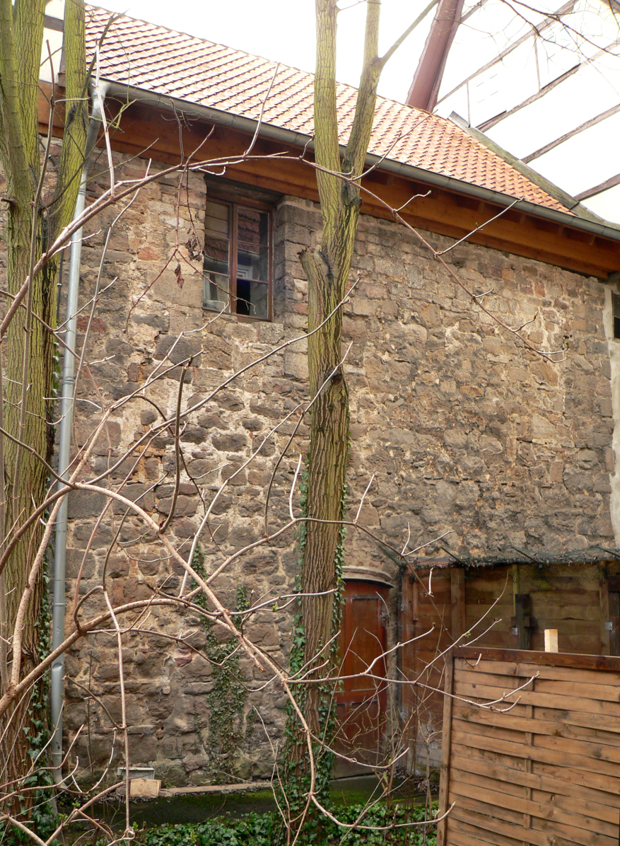 Hinterer und älterer Teil des Steinwerk Münden